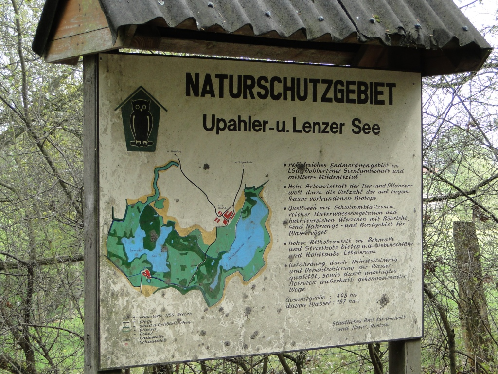 Naturschutzgebiet Upahler und Lenzener See, südlich Güstrow, in Mecklenburg-Vorpommern.